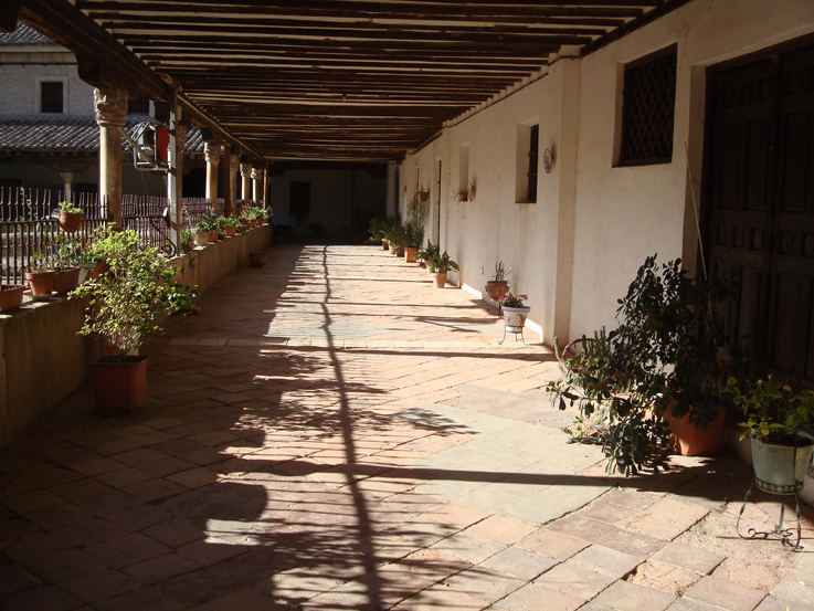 Claustro alto de la Catedral de Toledo.